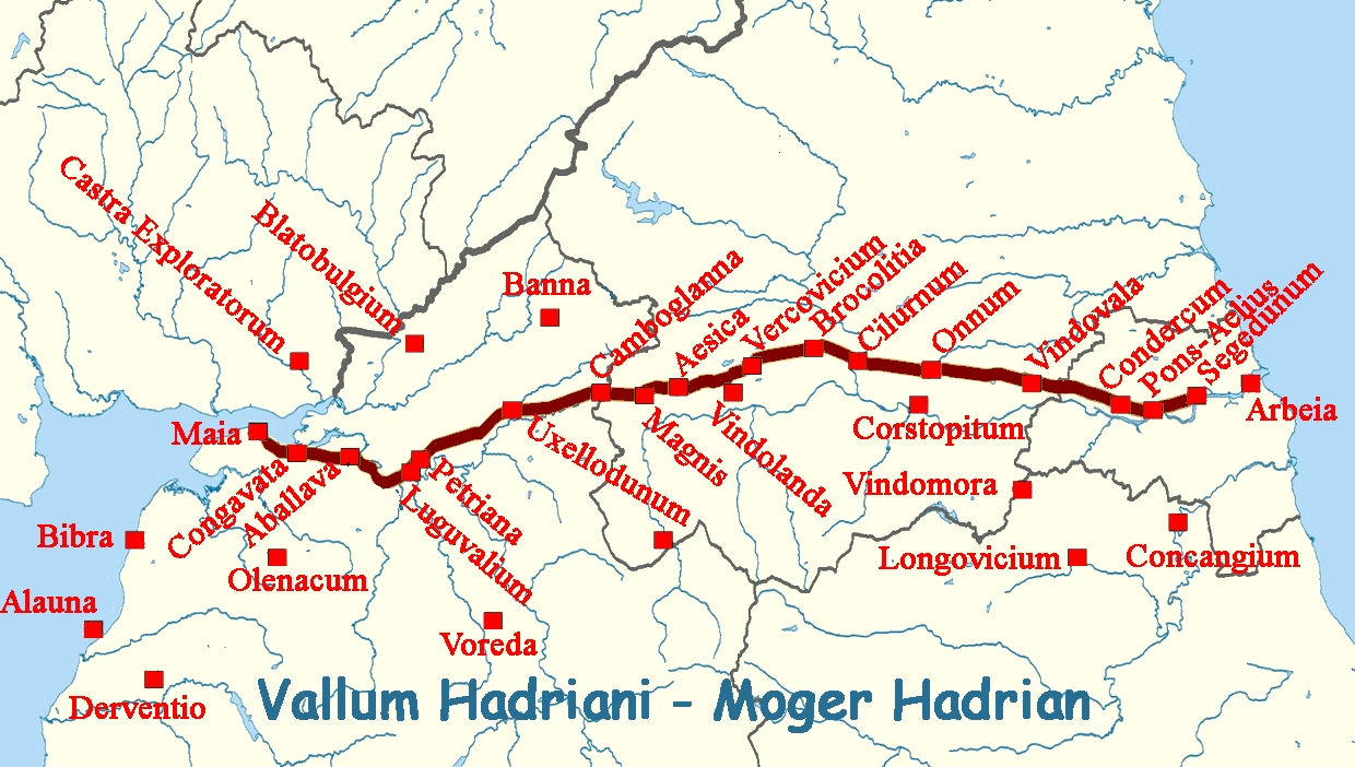 Kreñvlioù Moger Hadrian